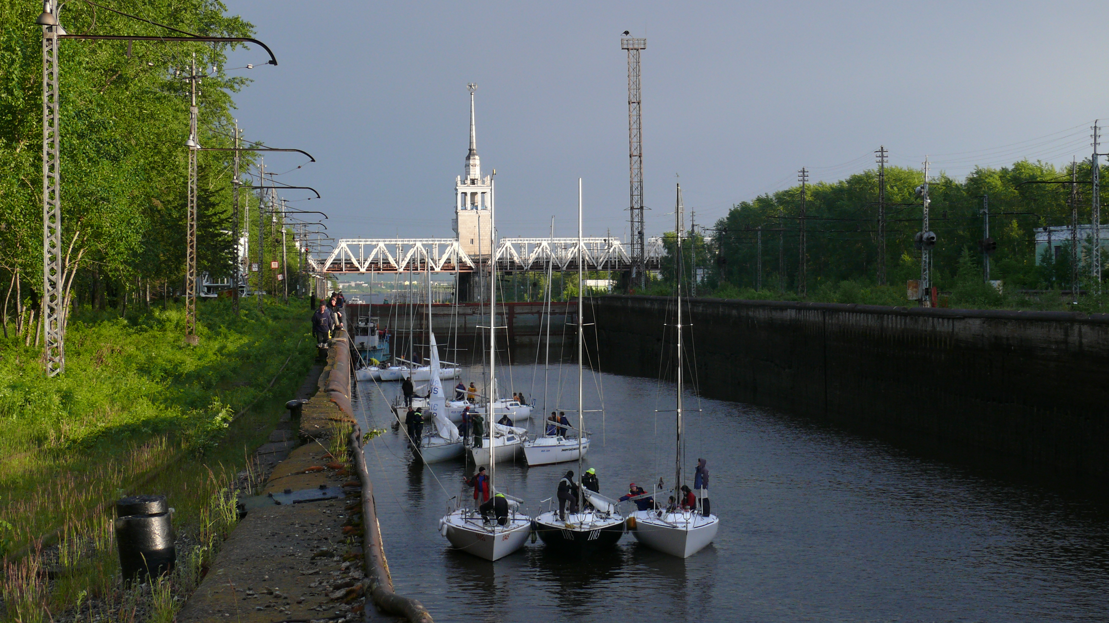 Шлюзовка яхт на КамГЭС